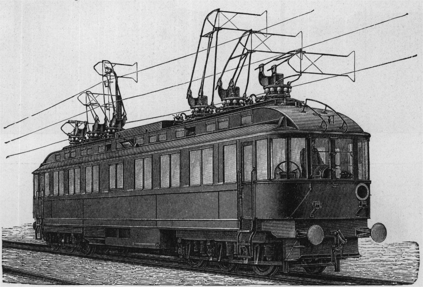 Motorvagn, driven med trefasström på militärbanan Berlin-Zossen (blixttåg)